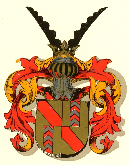 Wappen der Markgrafen von Hachberg-Sausenberg und Grafen von Neuenburg am See. Im 1. und 4. Feld das Wappen des Hauses Baden und seiner Nebenlinien, im 2. und 3. Feld das Wappen der Grafschaft Neuenburg am See.